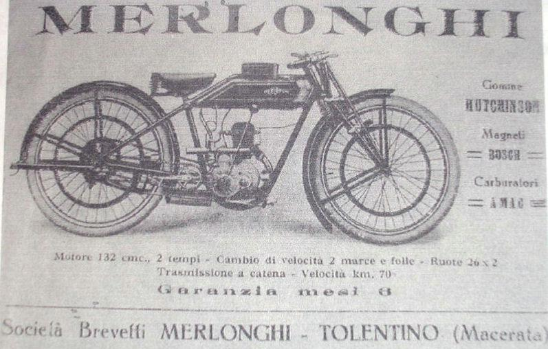 Advertentie uit 1926 van een niet meer bestaand bedrijf